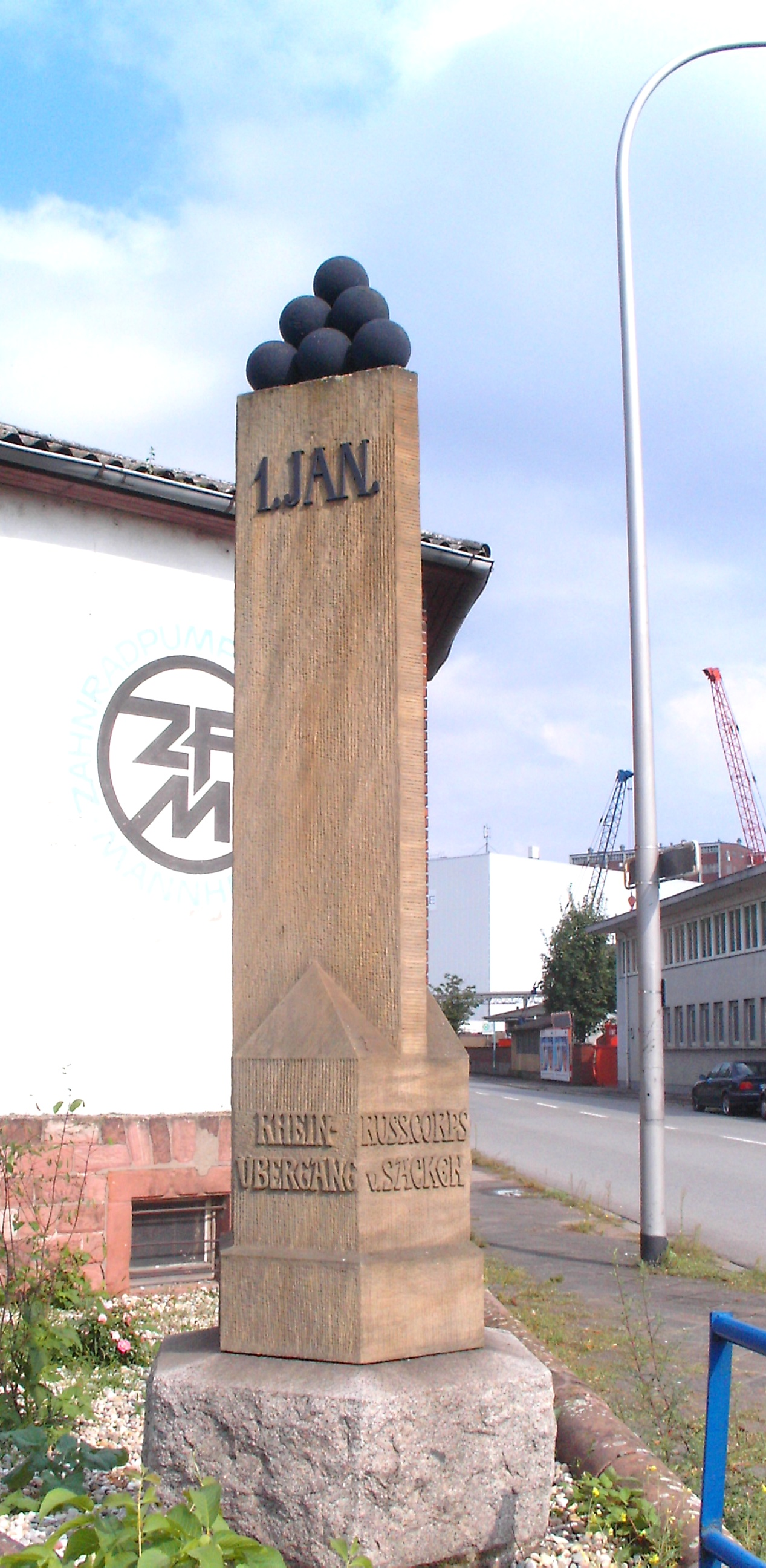 Mannheim, Friesenheimer Str., Denkmal an der Stelle des Rheinübergangs der Allierten, 1814 (früher war die Stelle linksrheinisch, durch die Rheinbegradigung ist sie jetzt rechtsrheinisch)